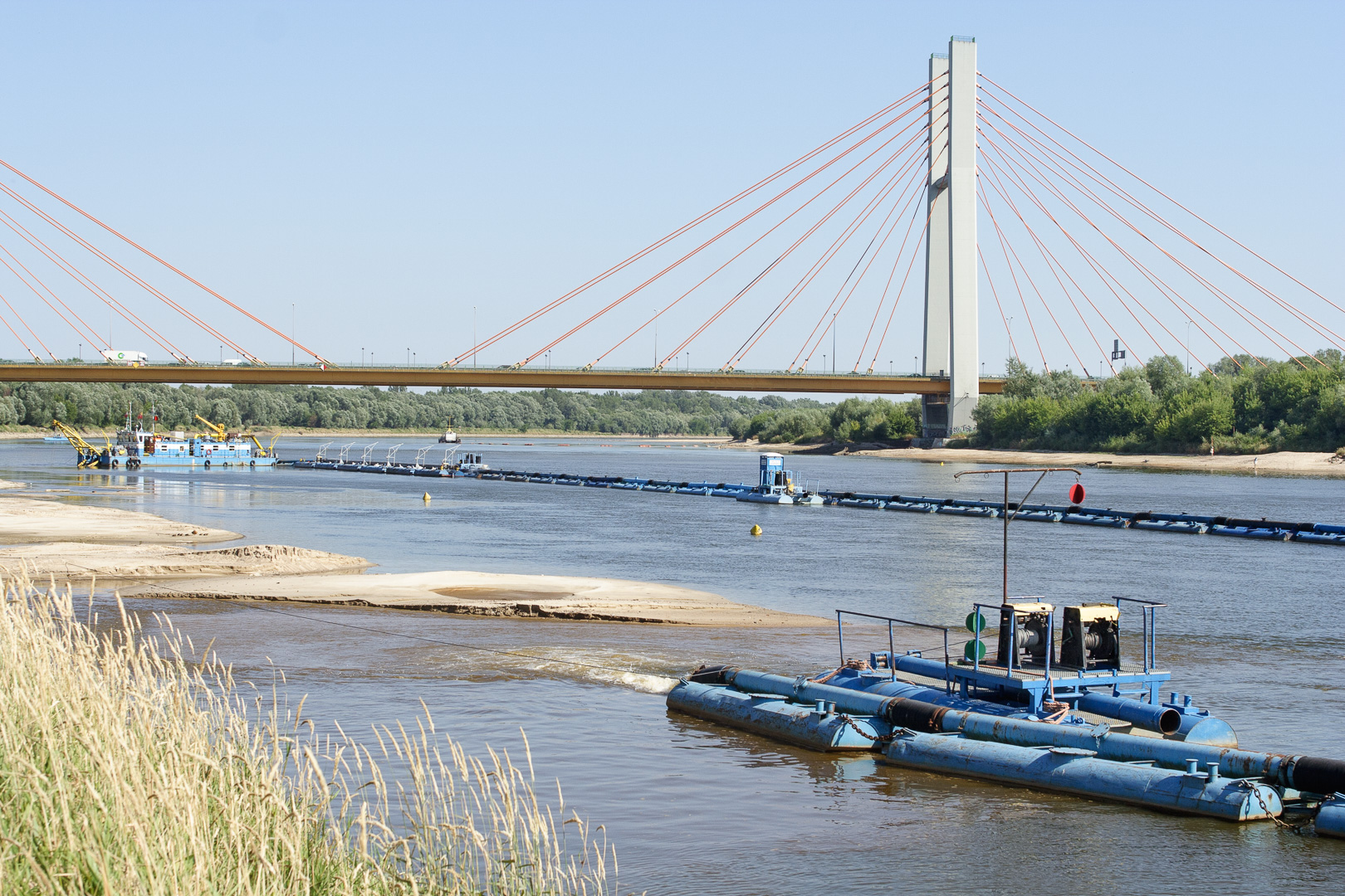 Pogłębiarka ssąco - refulacyjna (tzw. piaskarka) „Sawa” podczas pracy na Wiśle w Warszawie tuż poniżej Mostu Siekierkowskiego, na wysokości Ujęcia Uzupełniającego nr 2. W głębi powyżej mostu widoczna pogłębiarka „Tryton” przy piaskarni Siekierki. This is a photography of Natura 2000 protected area with ID PLB140004